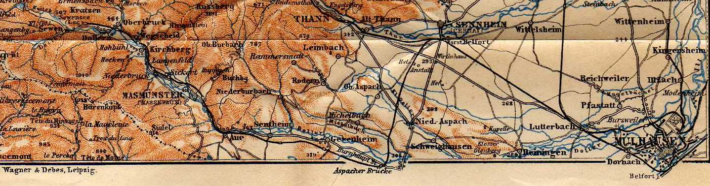 Extrait d'une carte allemande du sud des Vosges au 1/250.000 (vers 1900), montrant la vallée de la Doller